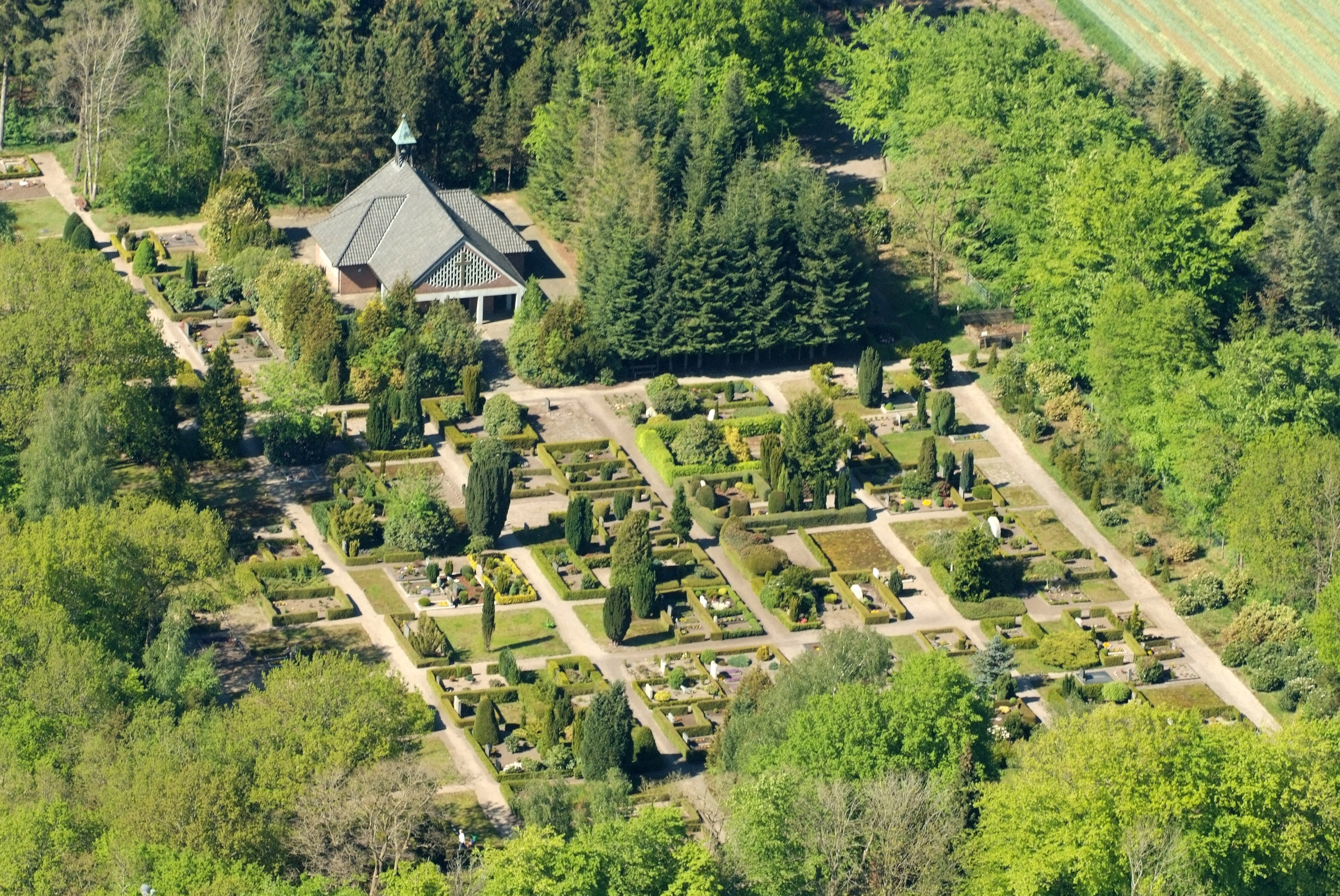 Friedhof in Knill (Nordholz) Fotoflug vom Flugplatz Nordholz-Spieka über Bremerhaven, Wilhelmshaven und die Ostfriesischen Inseln bis Borkum